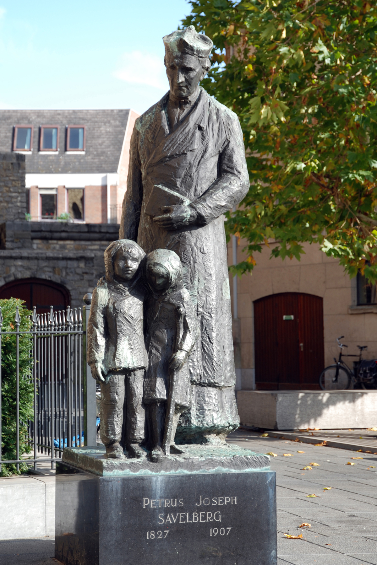 Peter Joseph Savelberg was een Nederlands priester en stichter van twee congregaties